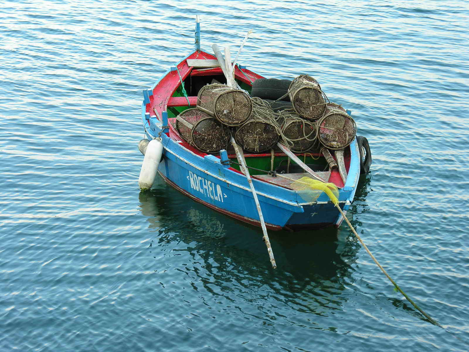 Foto tirada cunha Nikon E8800 Categoría:Imaxes de embarcacións Categoría:Imaxes de Ribeira